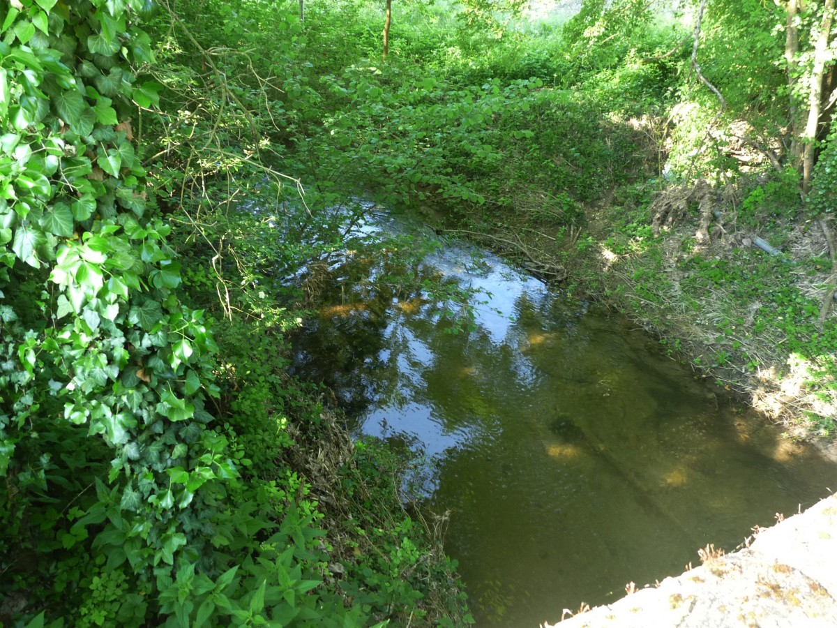 L'Auzance à Pontéreau, Brie-sous-Chalais, Charente, France